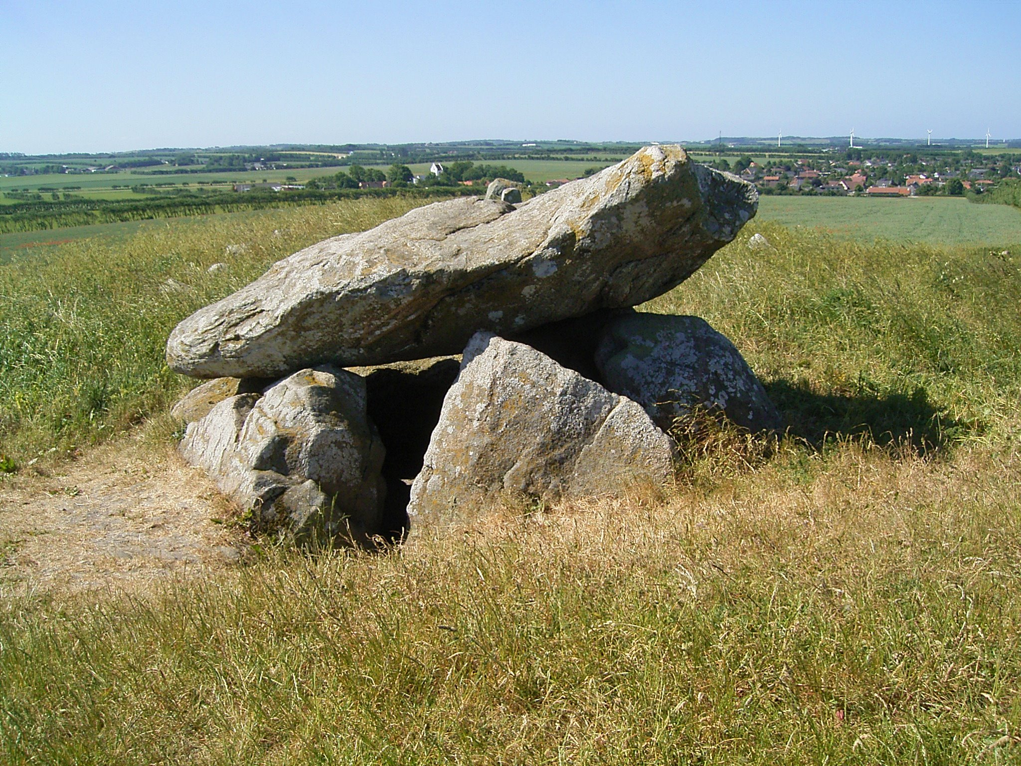 Troldkirken, Troldkirkevej, Sønderholm, 9240 Nibe, Denmark